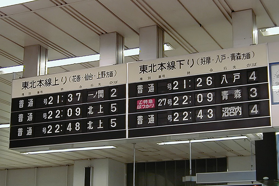 反転フラップ式案内表示機(盛岡駅/1999年6月)